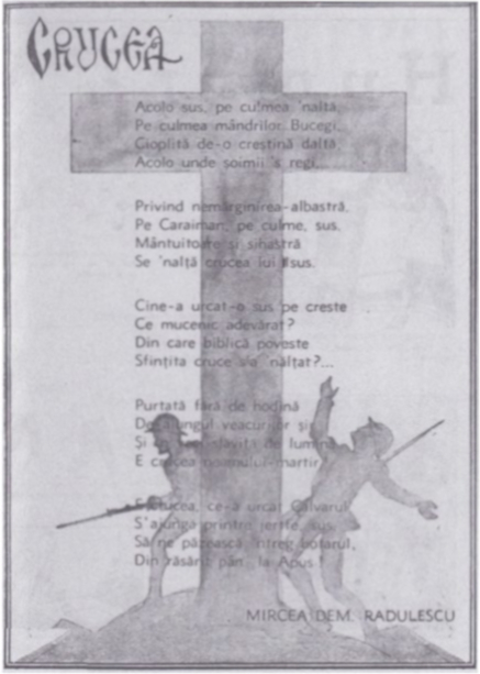 Poezia Crucea de Mircea Dem Rădulescu (n. 1889 - d. 1946)